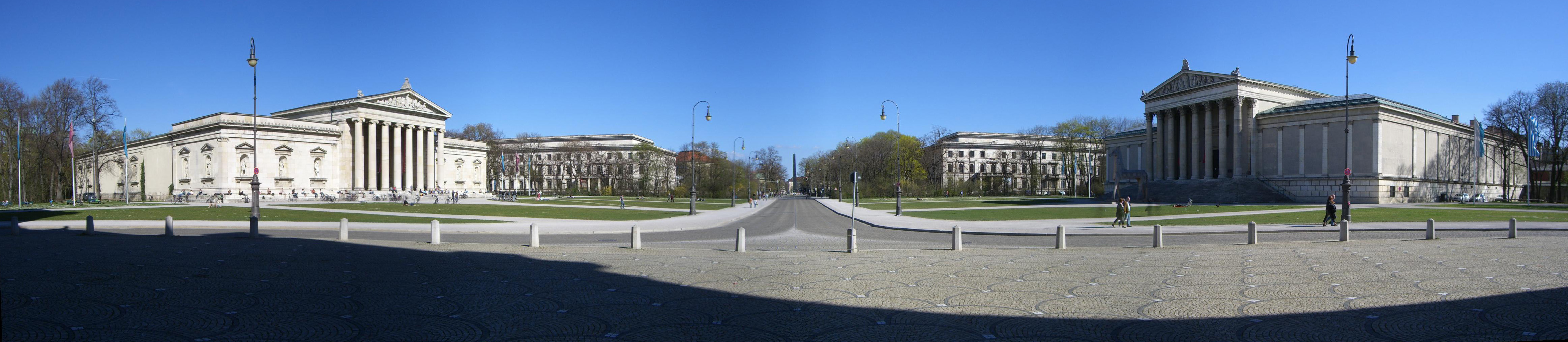 München: Königsplatz (Panorama)